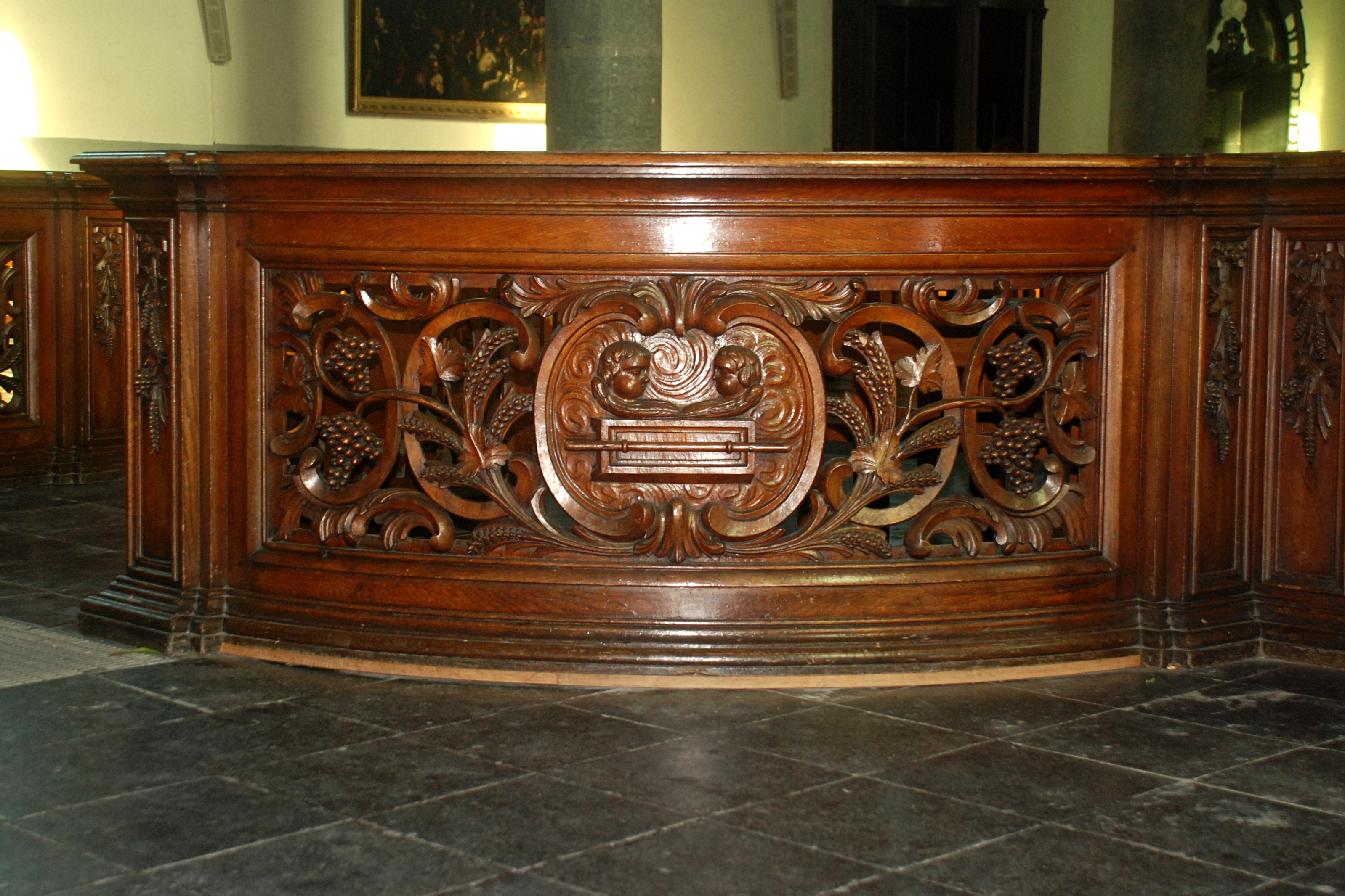 Belgique - Brabant wallon - Église de Court-Saint-Étienne